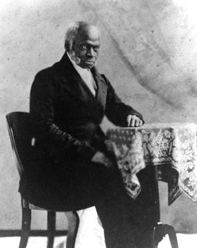 Venerable Pierre Toussaint, philanthropist